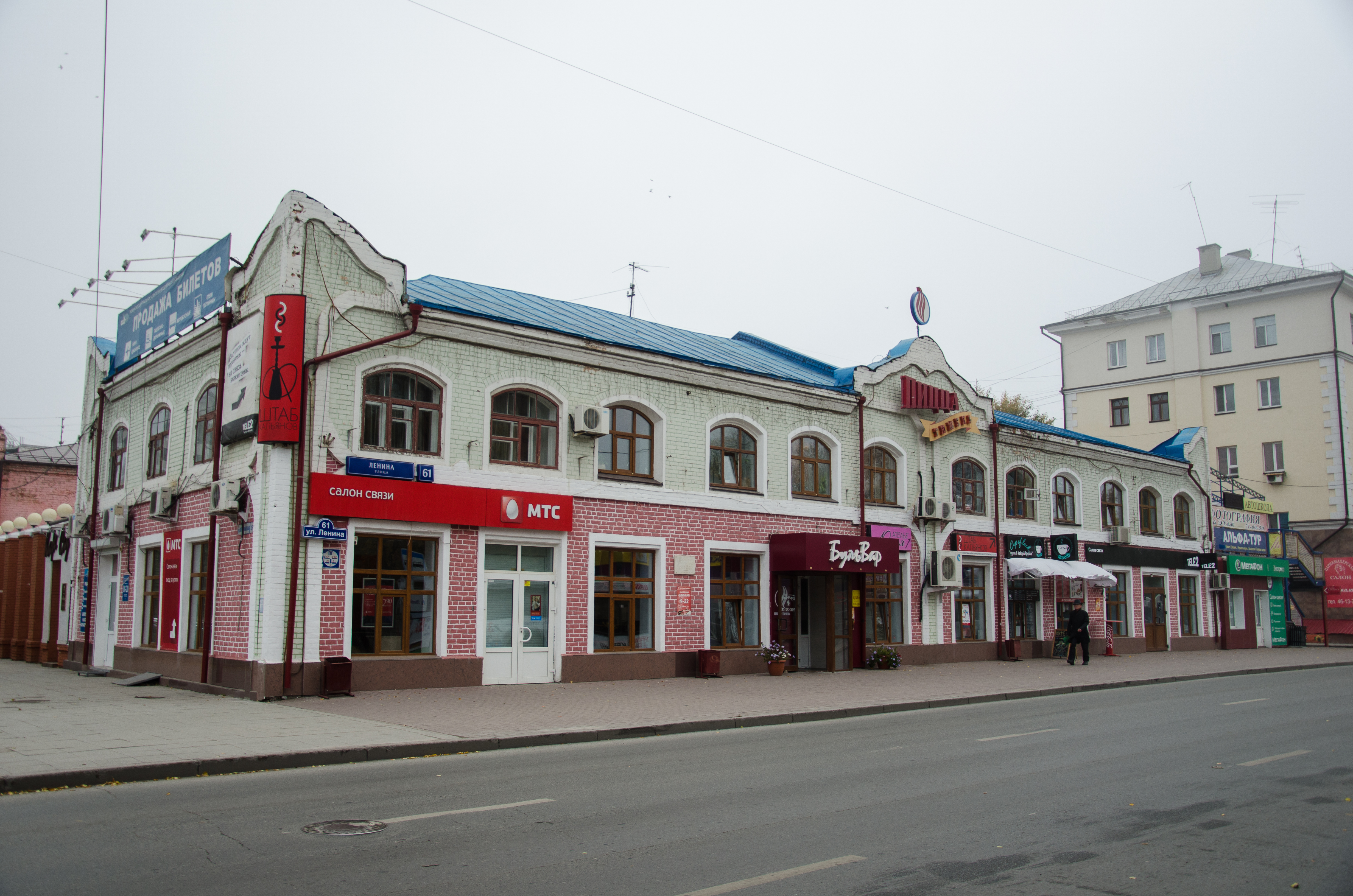 Бакалейно-мучной магазин В.Л. Жернакова: улица Ленина, 61, Тюмень, Тюменская область